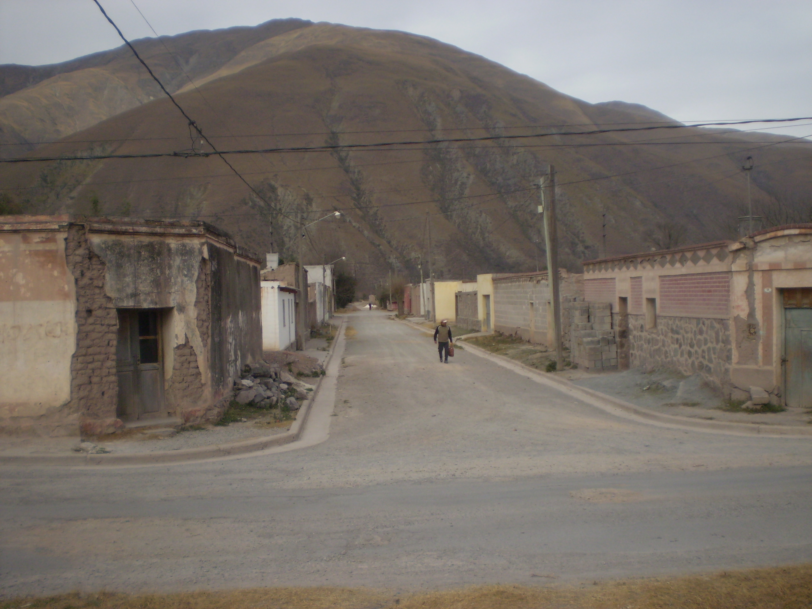 Centro del visitante en la localidad de Volcán (Jujuy), en la antigua estación del ferrocarril General Belgrano que unía las ciudades de La Quiaca y Tucumán.